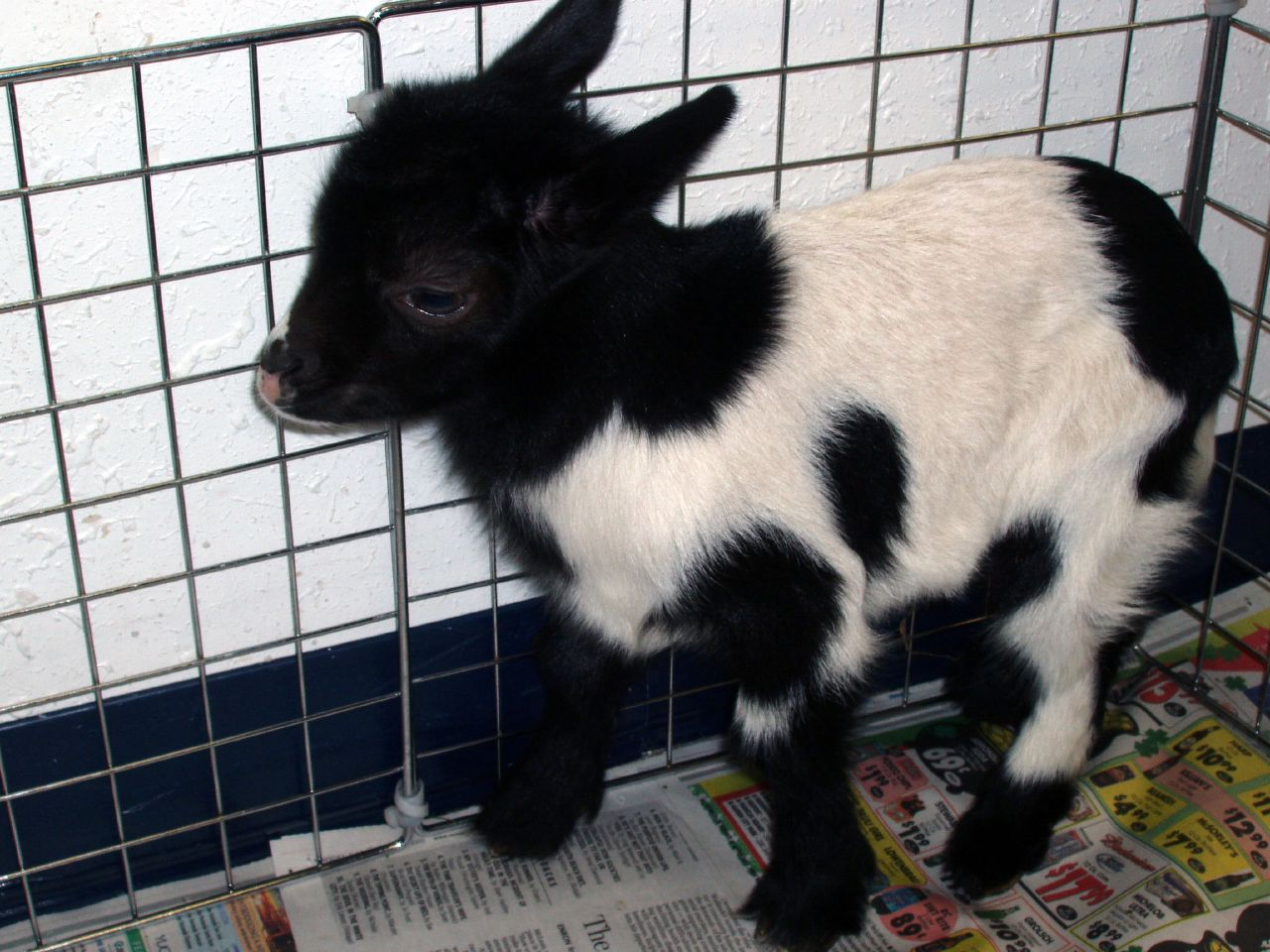 Ziege.